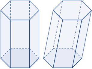 En el prisma recto, las caras y su altura son perpendiculares a la base. No ocurre así en el oblicuo. Además, las caras laterales del prisma recto son rectangulares.